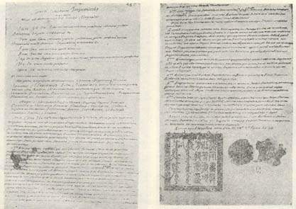 Экземпляр Нерчинского договора 1689 года на латинском языке